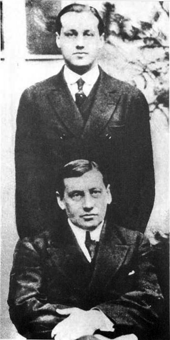 Arturo Alessandri y su hijo Jorge Alessandri. Fotografía de 1920.